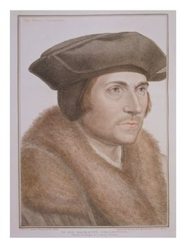 Tekening door Hans Holbein de Jonge (Augsburg, 1497/98 – Londen, 29 november 1543)